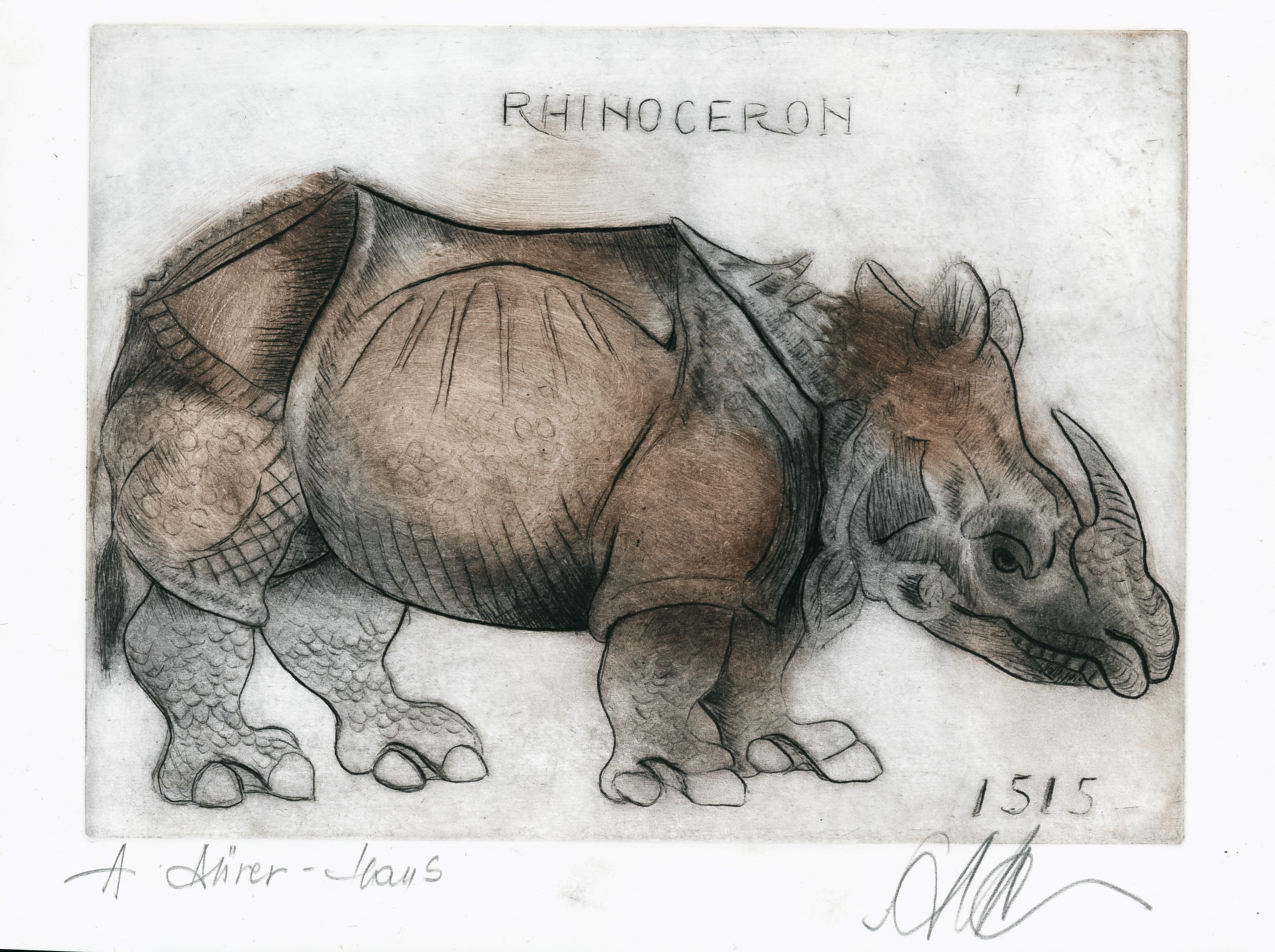 Rhinoceros, Sofia Fränkl rézmetszetének reprodukciója